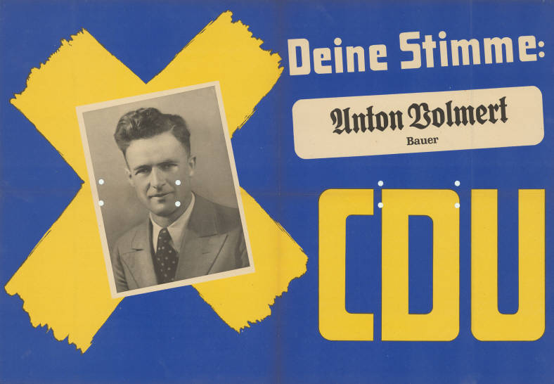 Deine Stimme: Anton Volmert Bauer CDU Abbildung: Porträtfoto - Stimmkreuz Plakatart: Kandidaten-/Personenplakat mit Porträt Objekt-Signatur: 10-009 : 201 Bestand: Landtagswahlplakate Nordrhein-Westfalen (10-009) GliederungBestand10-18: Landtagswahlplakate Nordrhein-Westfalen (10-009) » Landtagswahl am 18.6.1950 » CDU » mit Porträtfoto Lizenz: KAS/ACDP 10-009 : 201 CC-BY-SA 3.0 DE